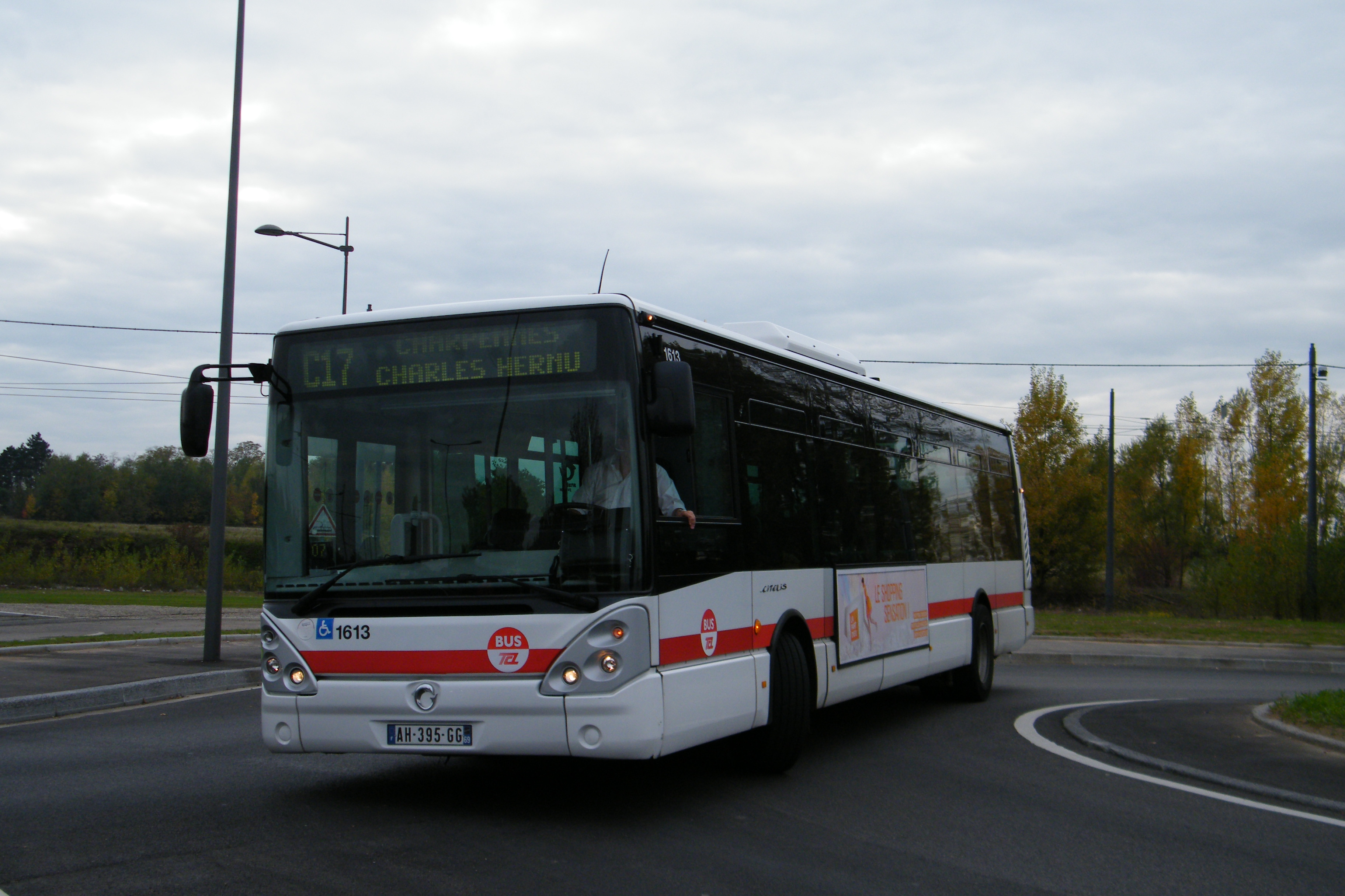 L'Irisbus Citelis 12 n°1613 du réseau TCL fait demi-tour au terminus de la Ligne C17 à Bron Porte des Alpes.